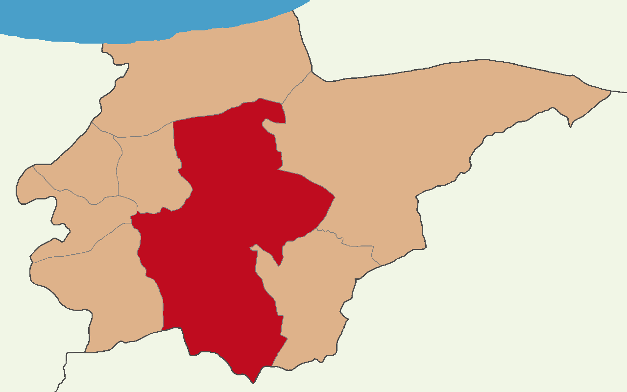 Düzce Merkez ilçesinin konumu